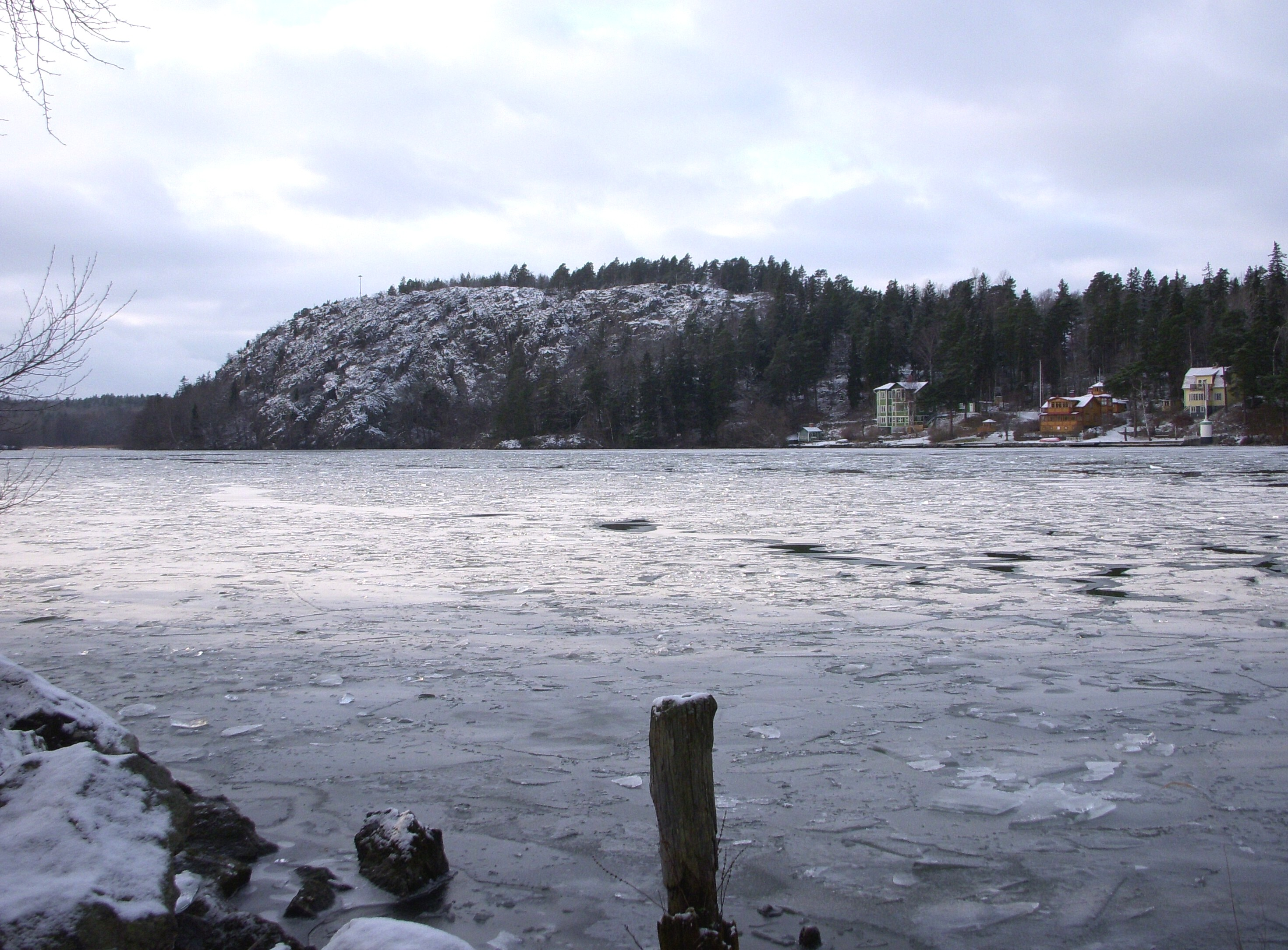 "Kungshatt", en ö i Mälaren